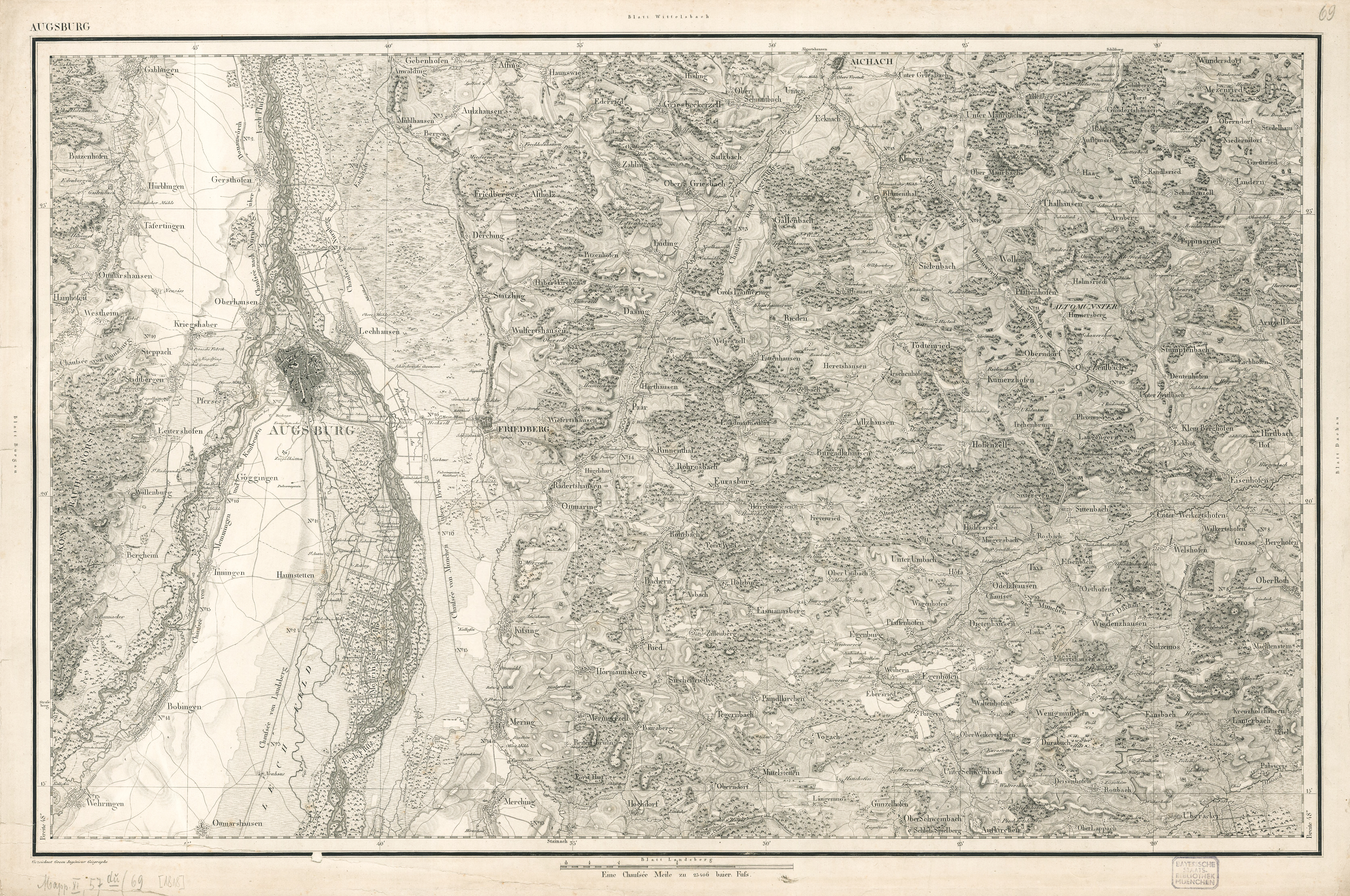 Augsburg, Topographischer Atlas vom Königreiche Baiern, 1:50000, Blatt 69